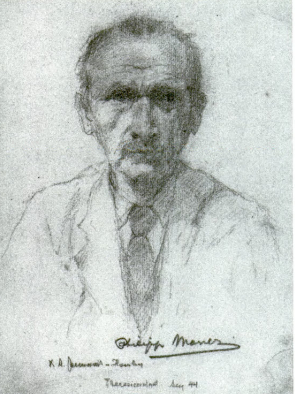 Arthur Goldschmidt: Porträt „Philipp Manes“, August 1944.